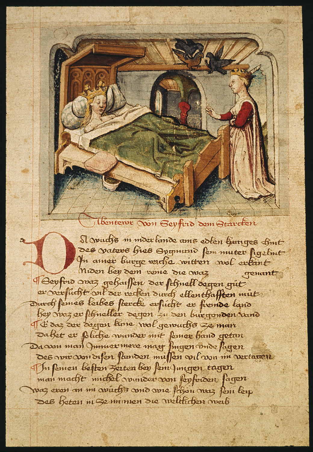 Nibelungenlied. Hundeshagenscher Kodex